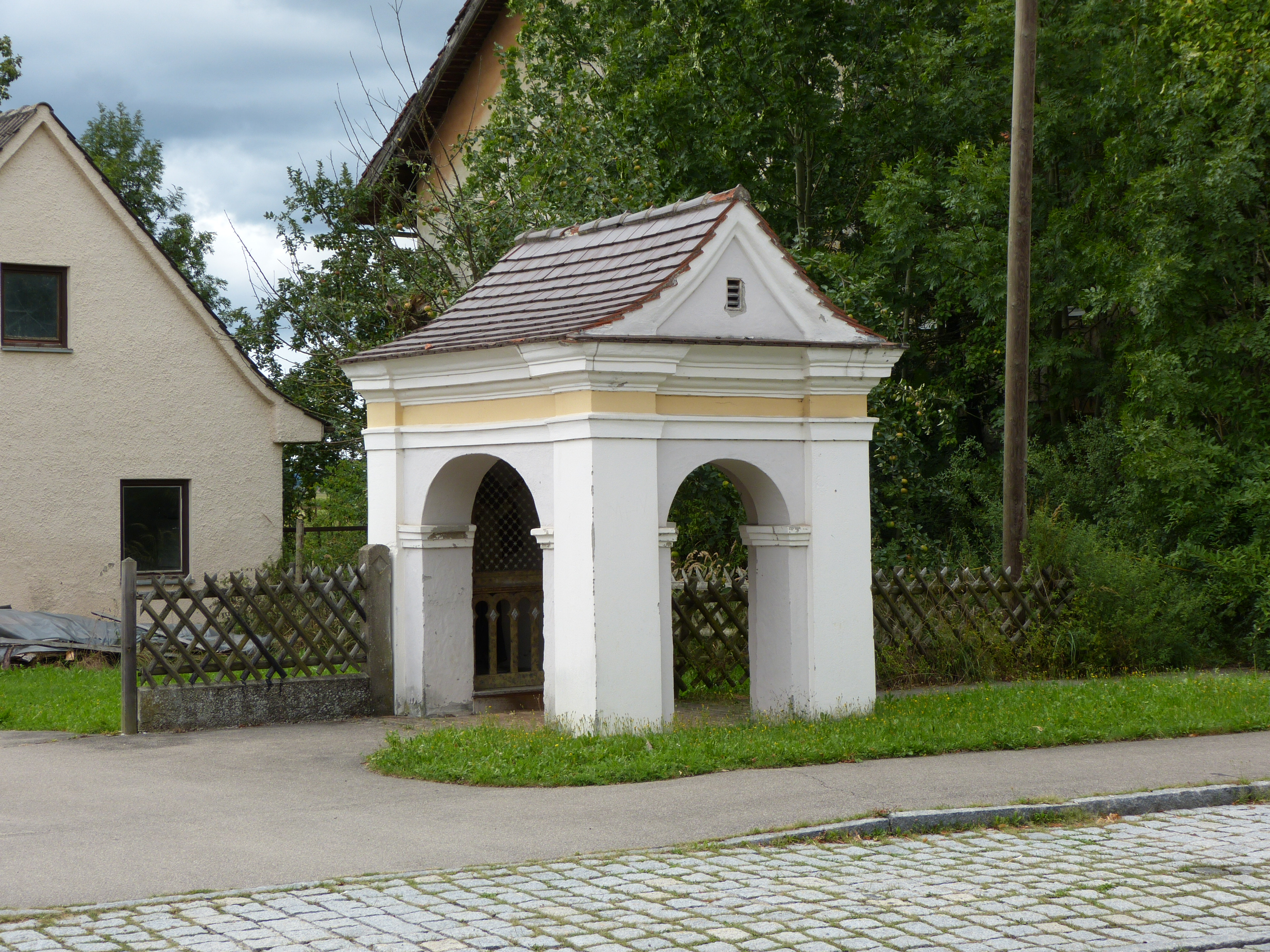 pilastergegliederter, nach drei Seiten in Arkaden geöffneter Bau mit halbrundem Schluss, 1. Hälfte 18. Jahrhundert; mit AusstattungThis is a photograph of an architectural monument.